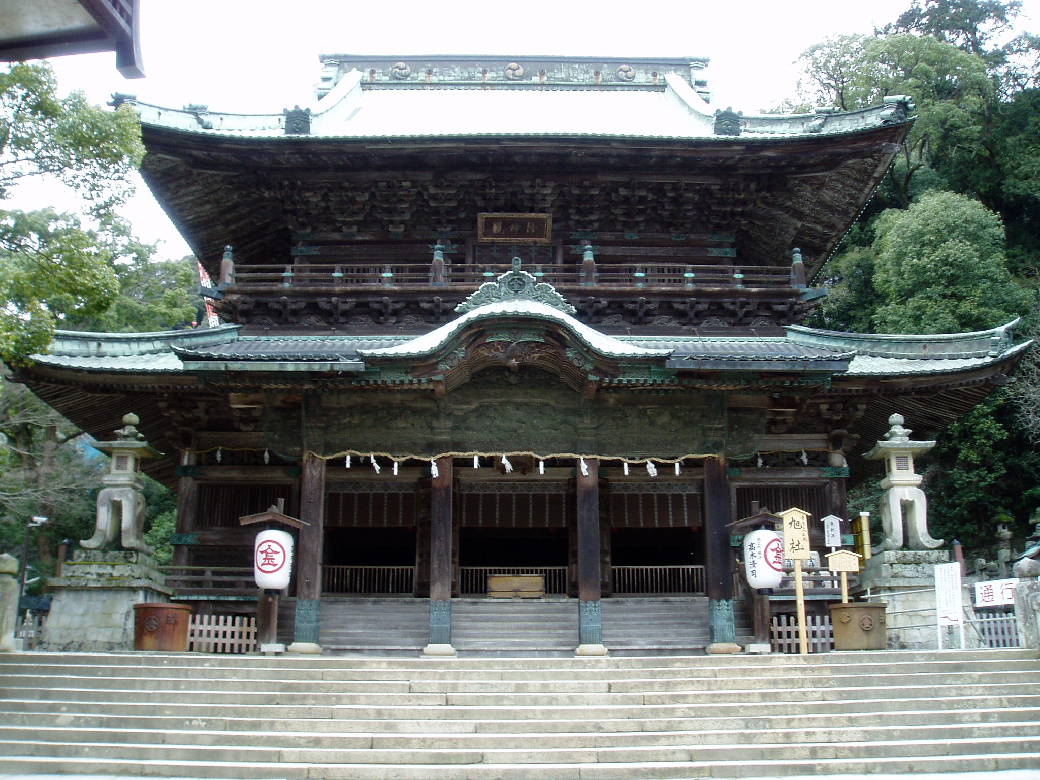 Asahi-sha (旭社) at Kotohira-gu (金刀比羅宮) in Kotohira, Nakatado, Kagawa, Japan.